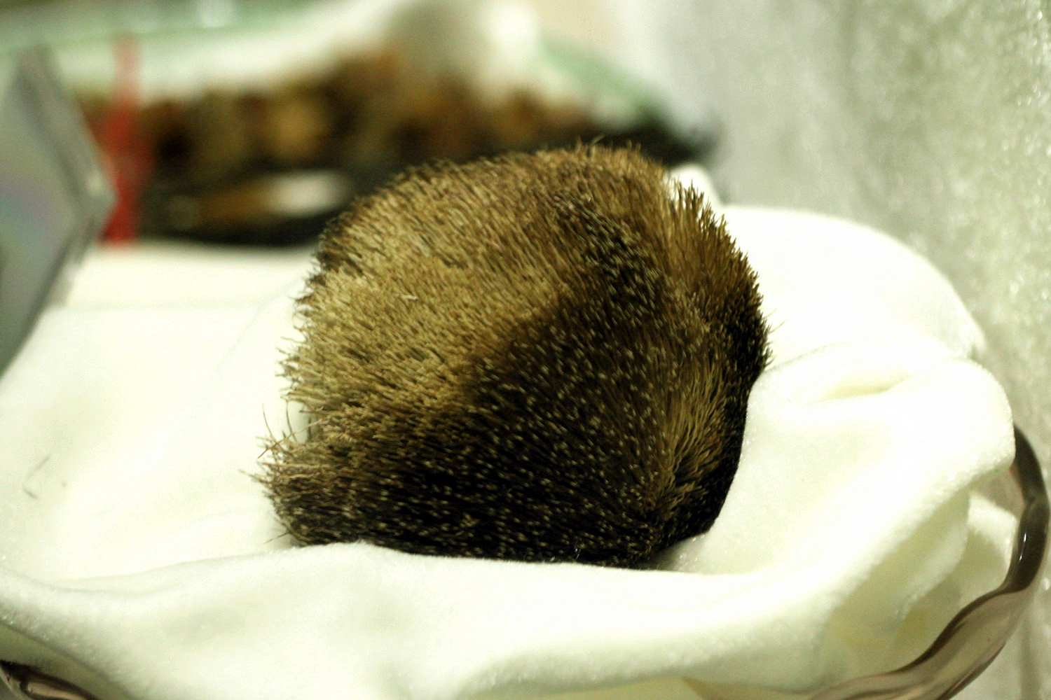 毛壳麝香，摄于广东中医药大学中医药博物馆